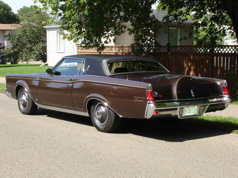 1971 Lincoln Continental Mark III